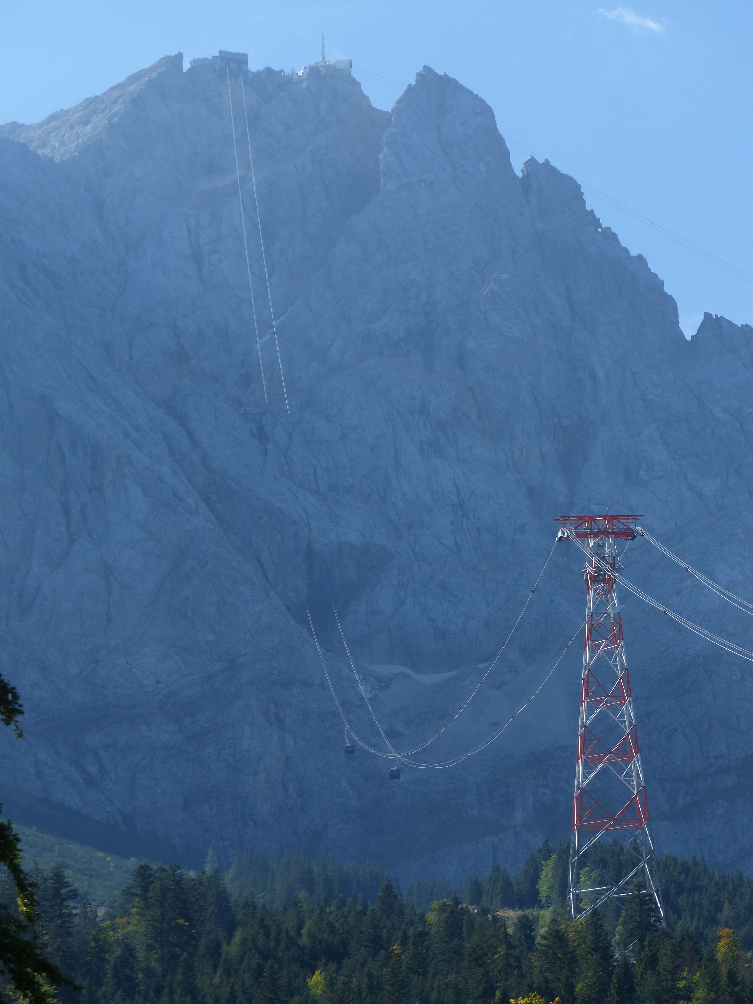 Seilbahn Zugspitze: Blick von Eibsee